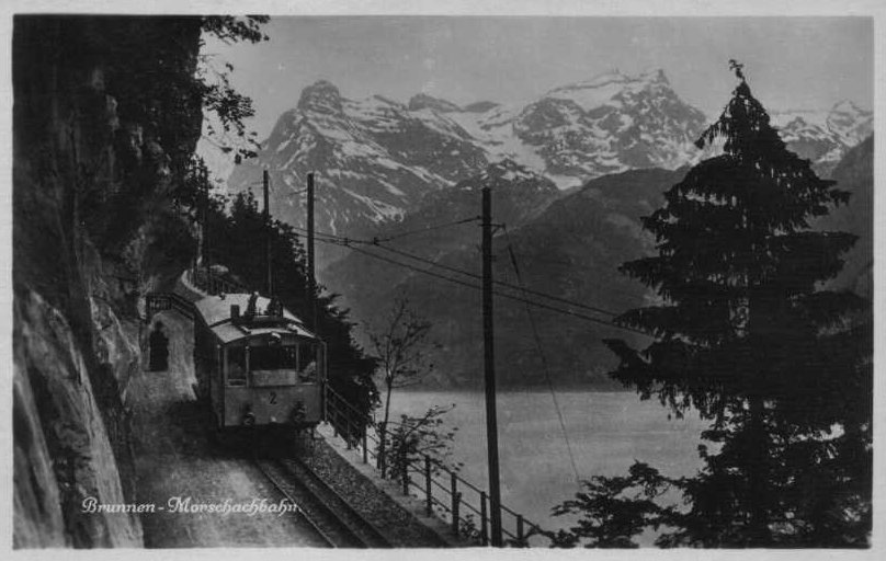 brunnen2